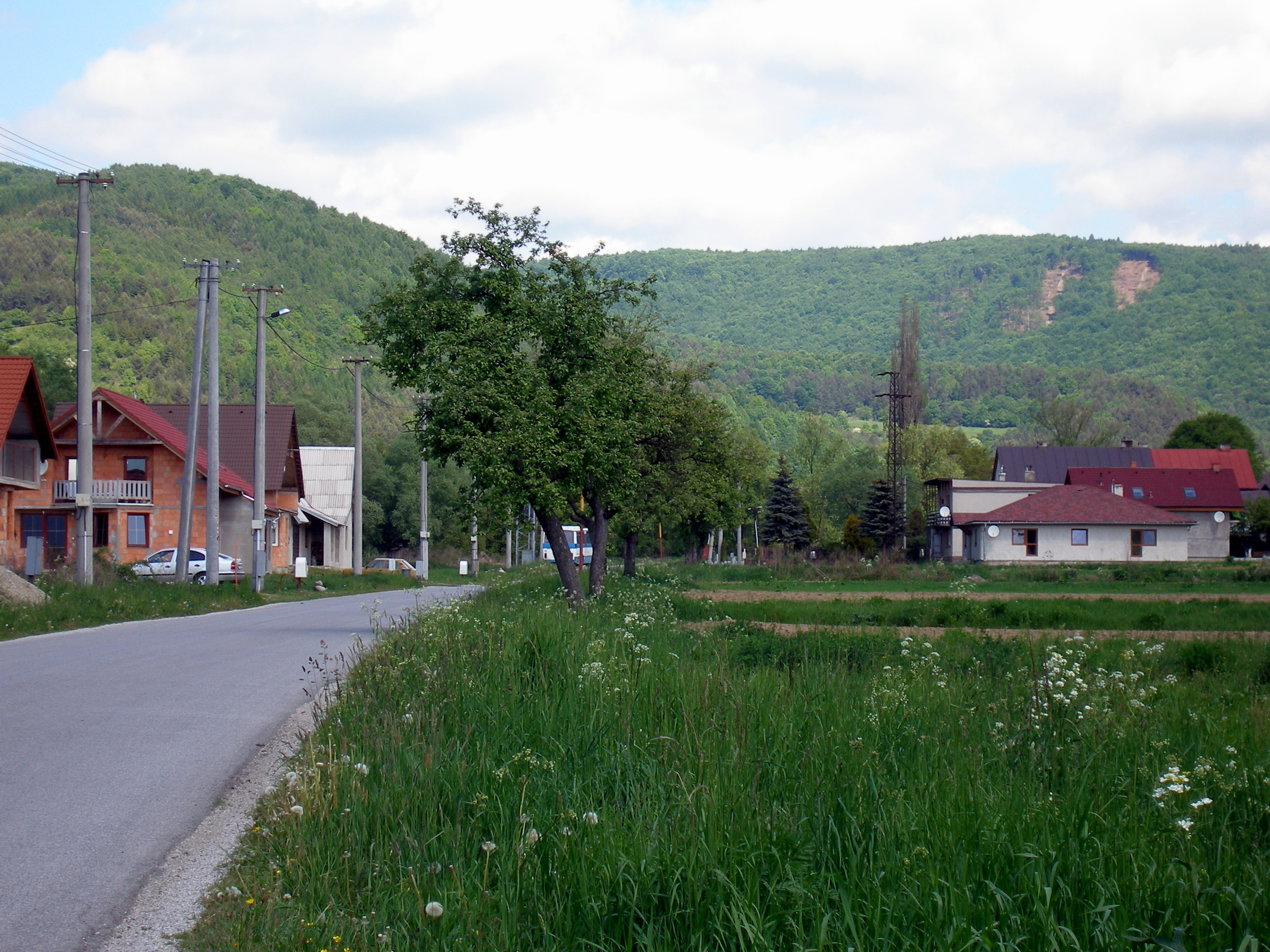 Obec Ľutina okres Sabinov.